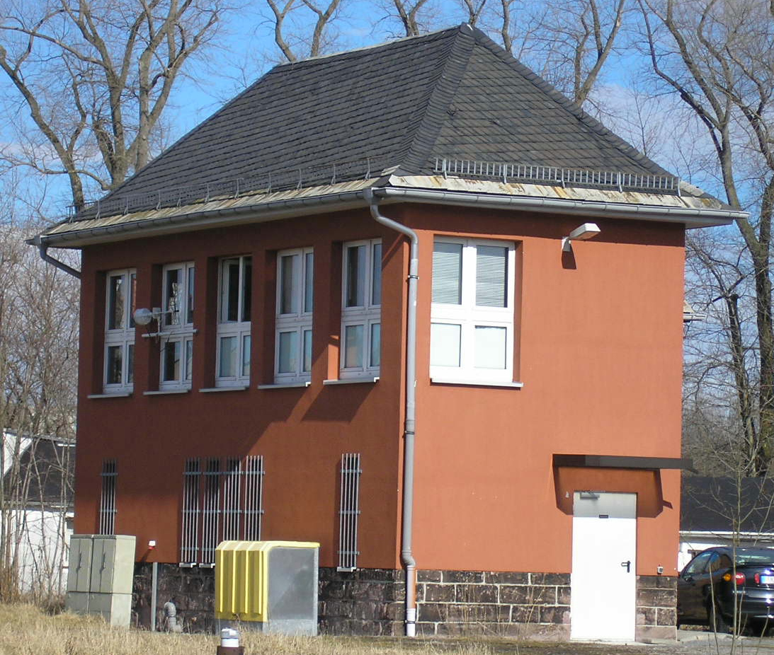 Das Stellwerk Nord im Ilmenauer Bahnhof.